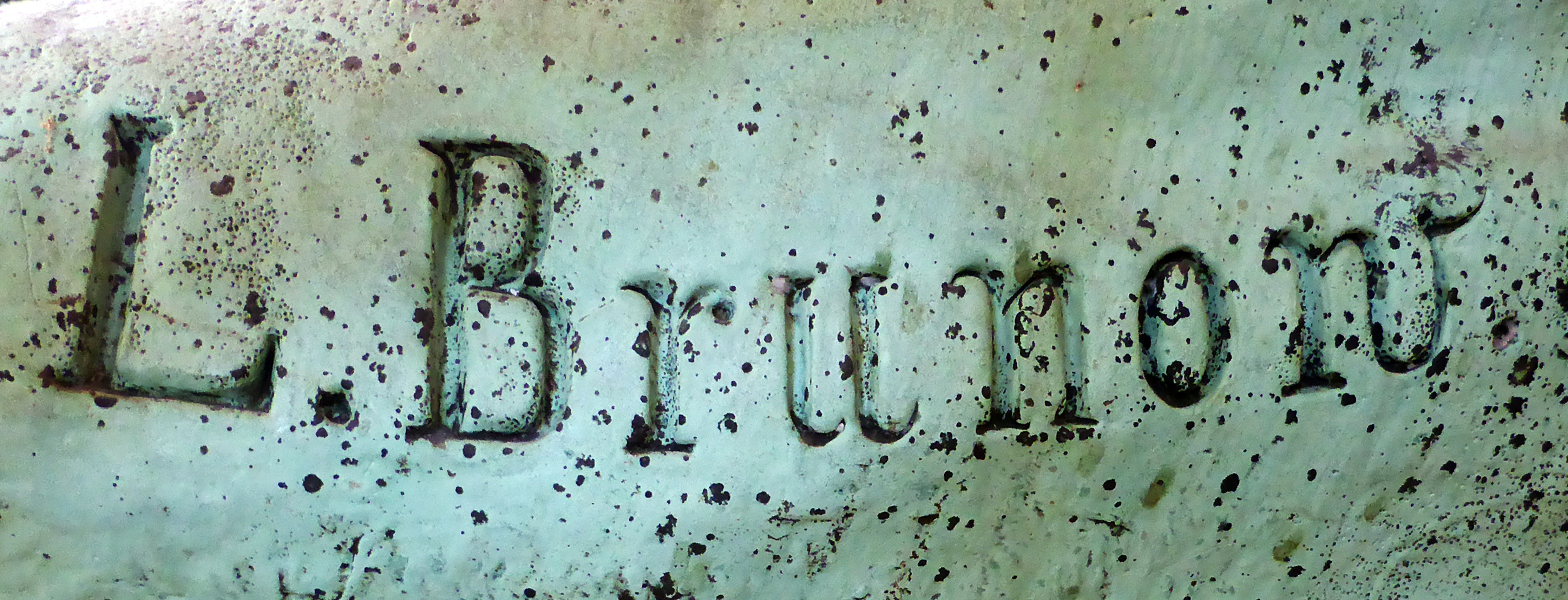 Künstlersignatur auf Figurengruppe Tag und Nacht. Galvanoplastik aus Kupfer vom Bildhauer Ludwig Brunow von 1880. Standen auf dem Anhalter Bahnhof (Berlin). Heute ausgestellt im Deutschen Technikmuseum Berlin. Wikipedianische KulTour am 10. Oktober 2015 in der Ausstellung des Museums.